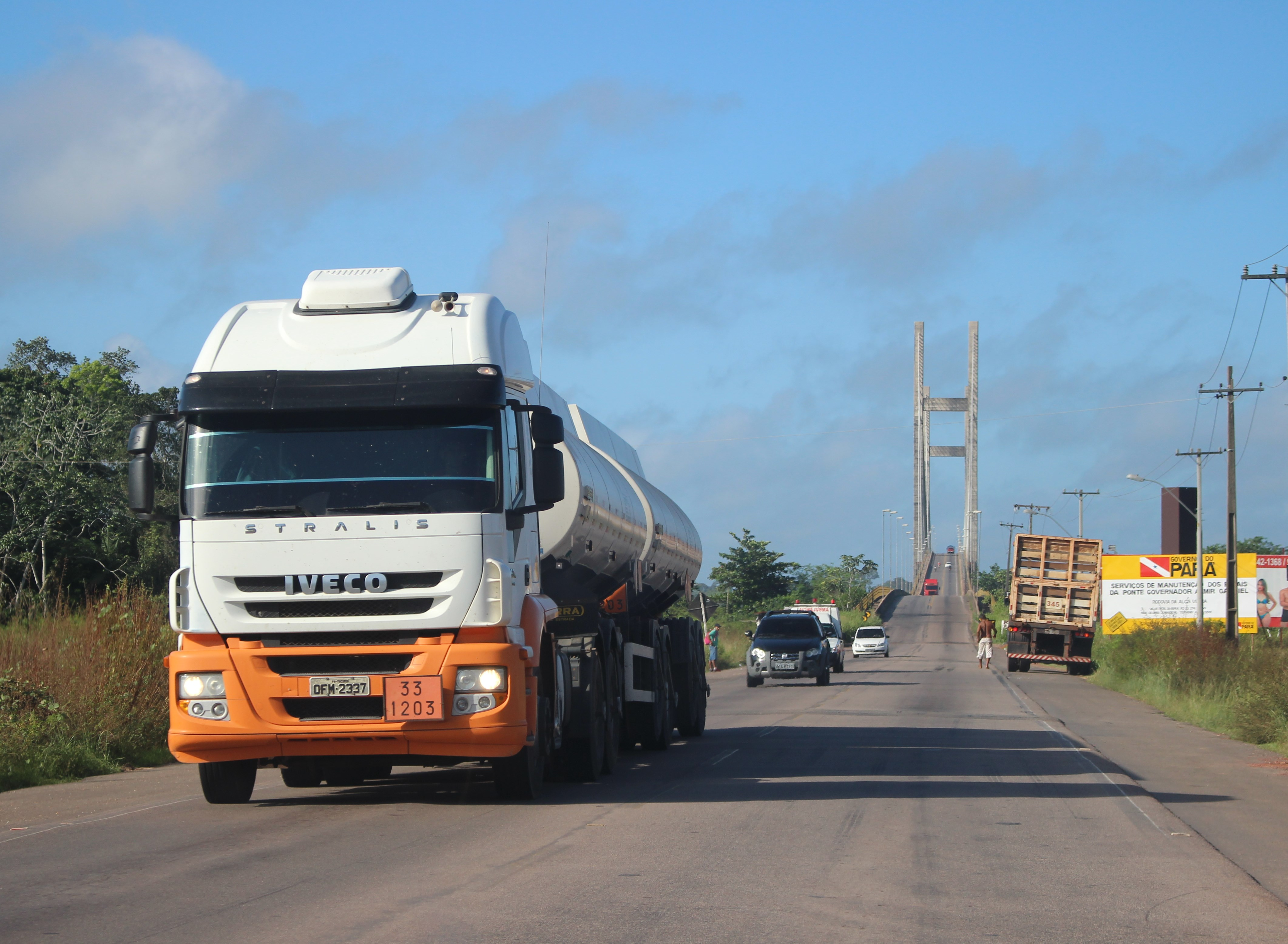 caminhão sentido marituba